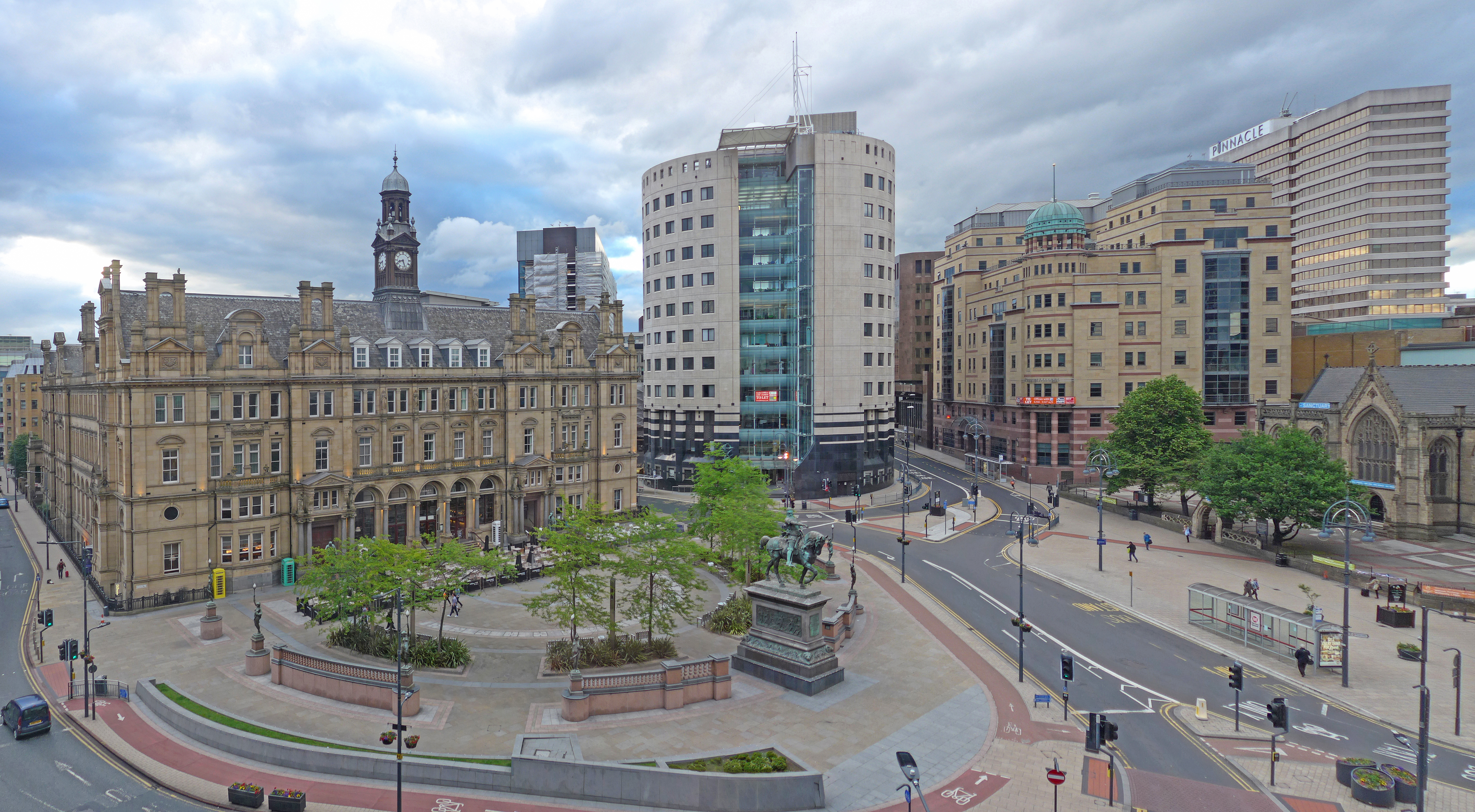 Leeds